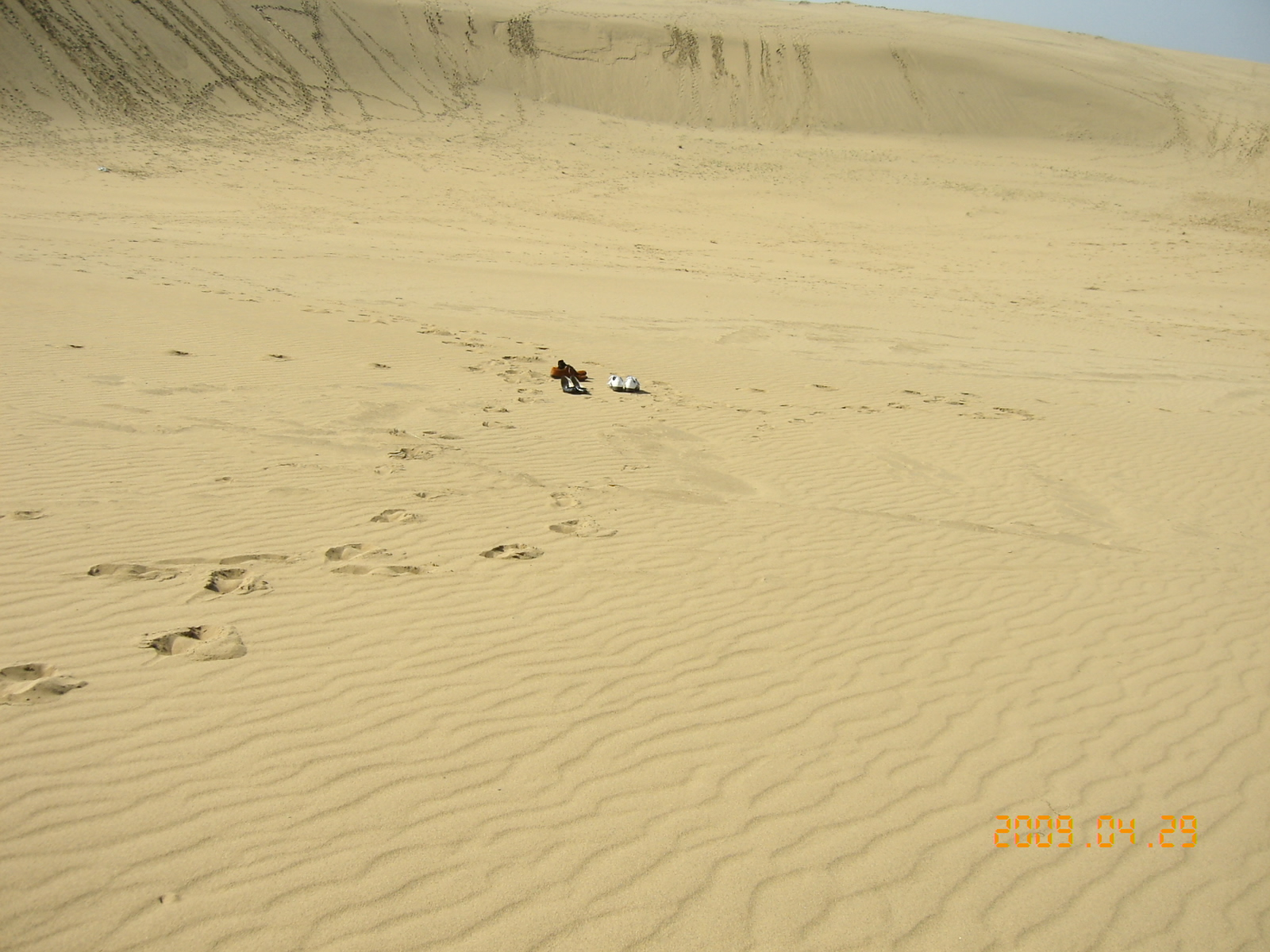 鳥取砂丘